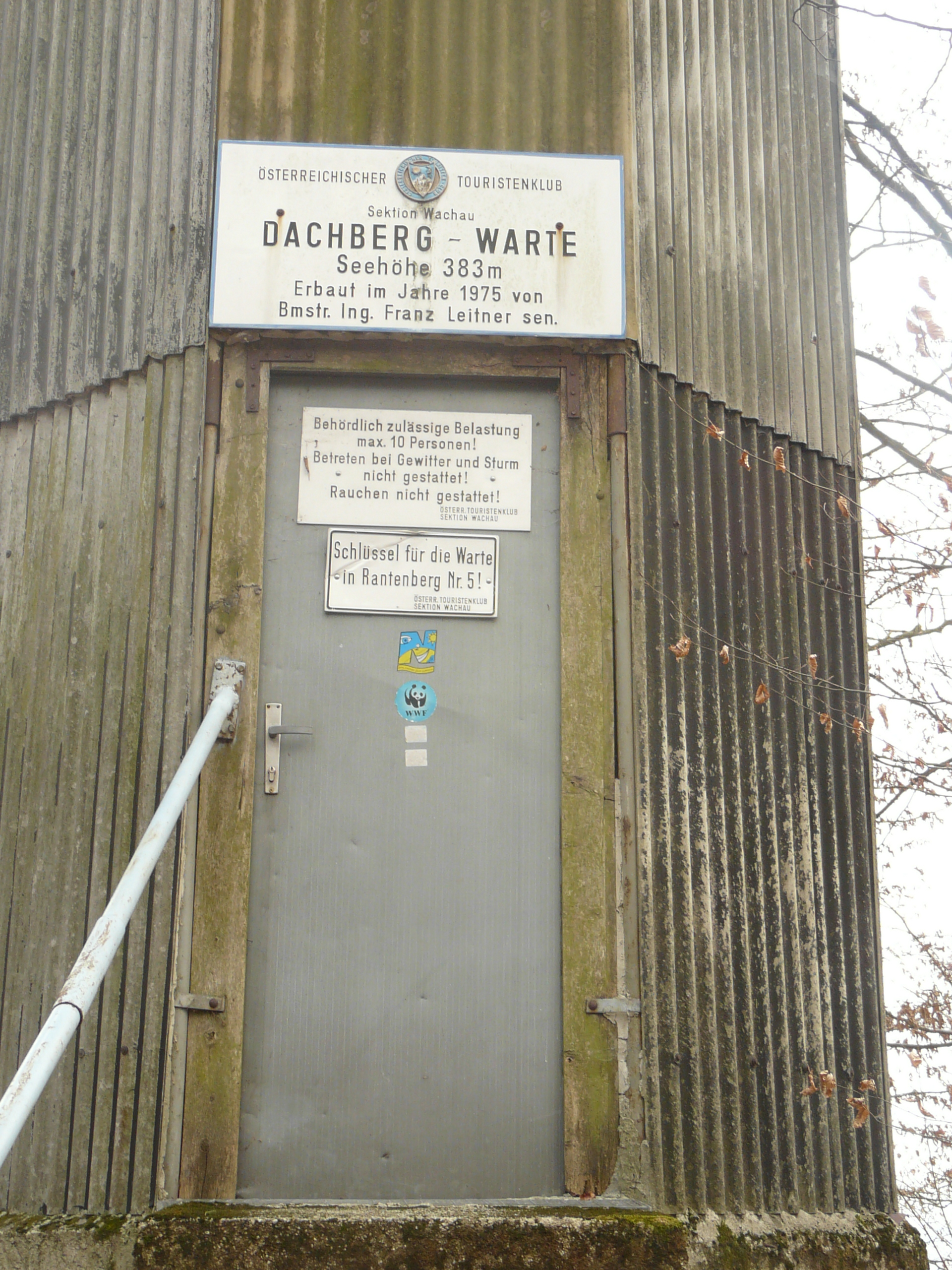 Dachbergwarte bei Emmersdorf